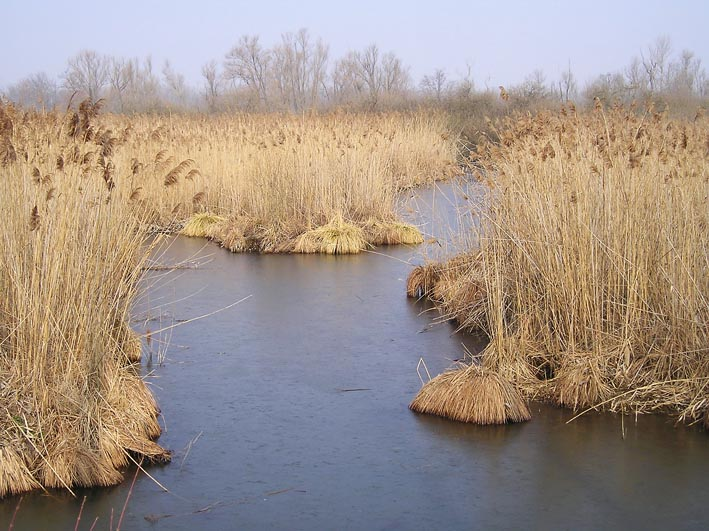 Lago di Sartirana Lomellina, Pavia, Italy - Il canneto